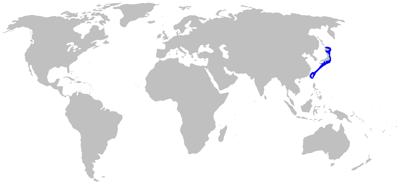 Distribution map for Cephaloscyllium umbratile